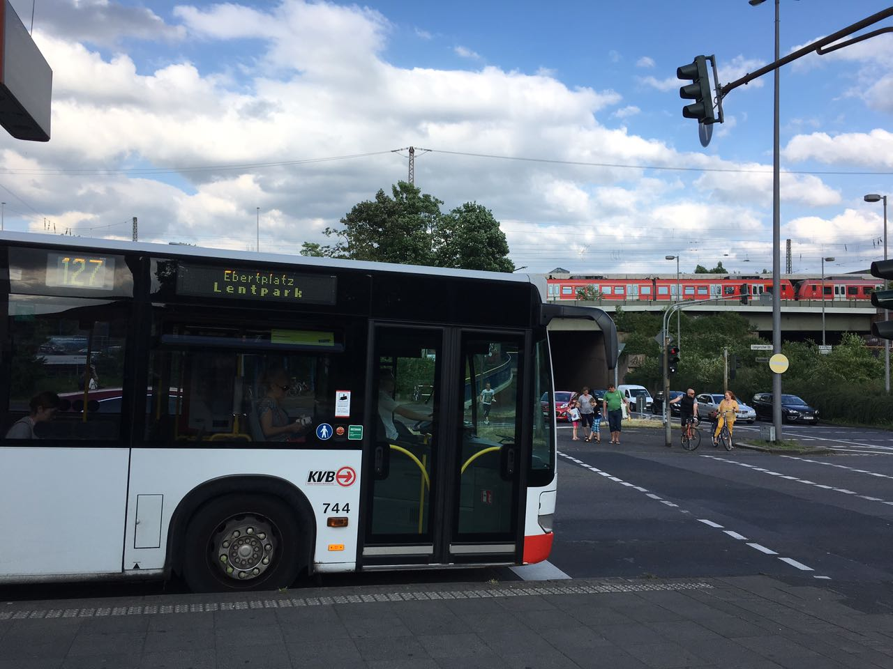 Haltepunkt Köln Geldernstr.-Parkgürtel(4)